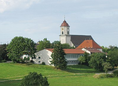 Kirch un Schuel vo Elleberg